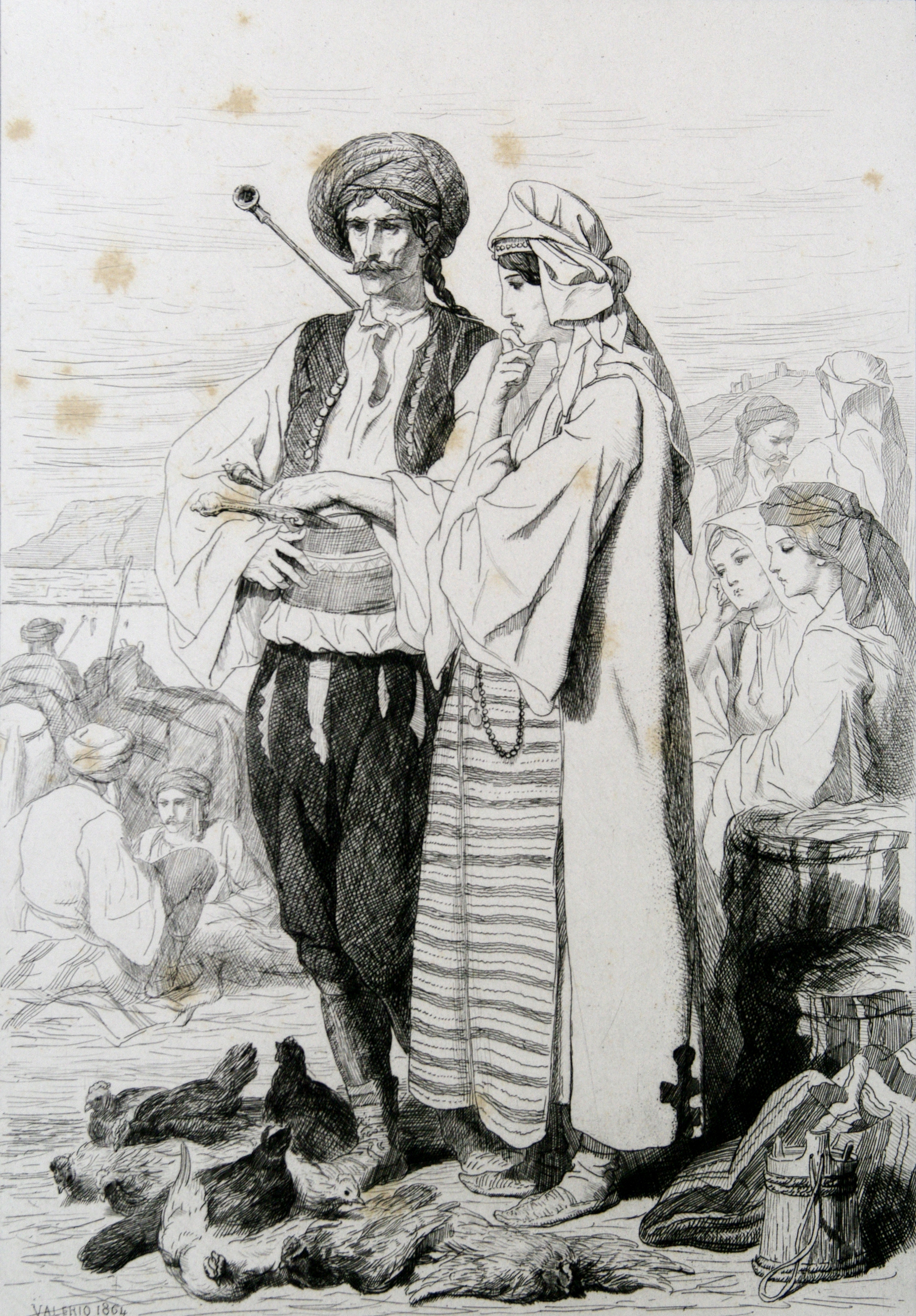 Paysan Morlaques des environs de Spalato